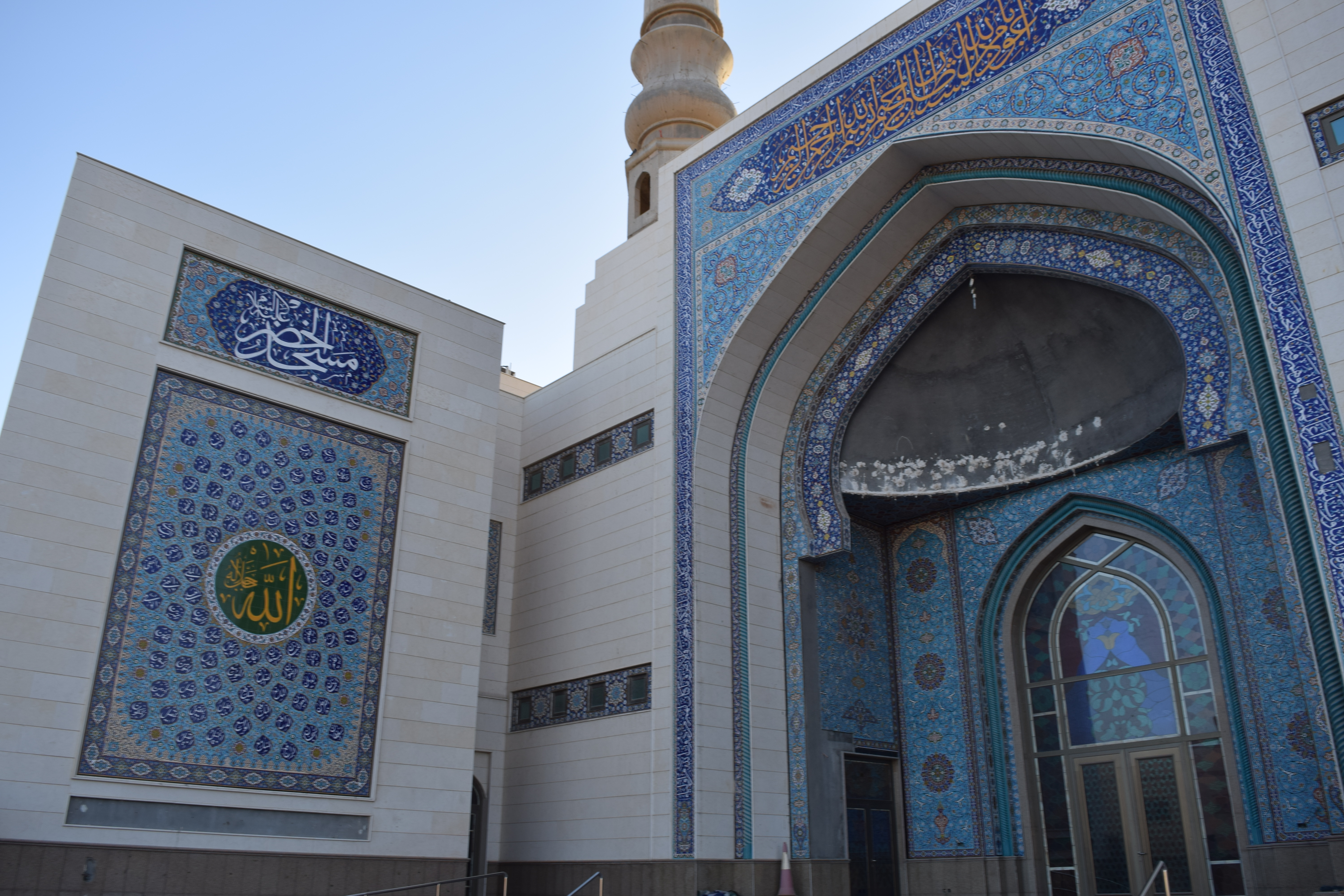 صورة أمامية لمسجد الخضر